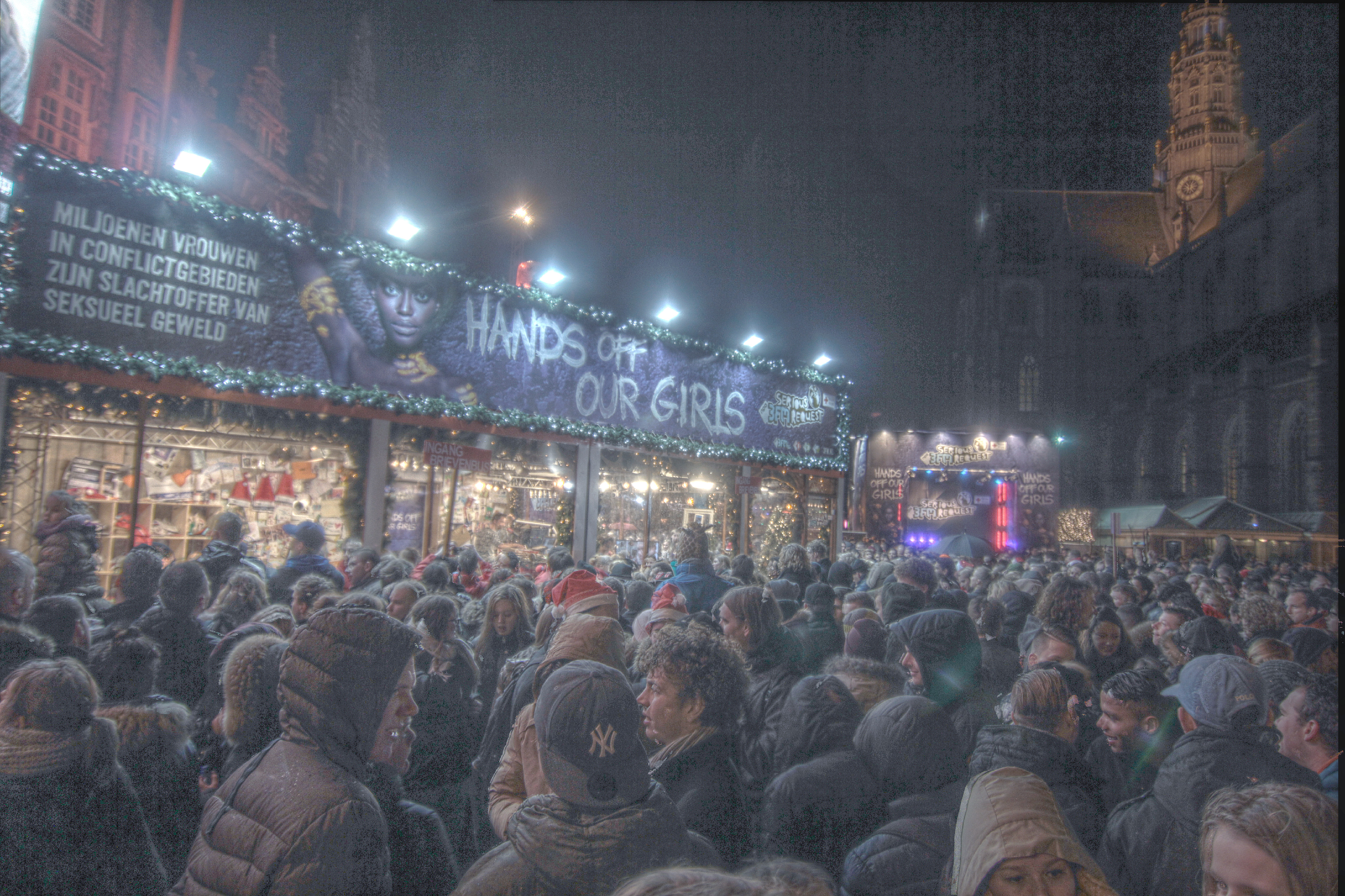 Serious Request, Haarlem Grote Markt. Dinsdagavond 23 december 2014, rond middernacht